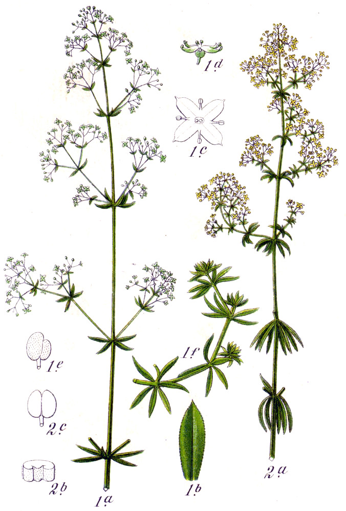 Galium album Mill. / Galium verum L. s. str. Original Caption 1. Ein weisses Labkraut, Galium cf. erectum 2. Echtes Labkraut, Galium verum